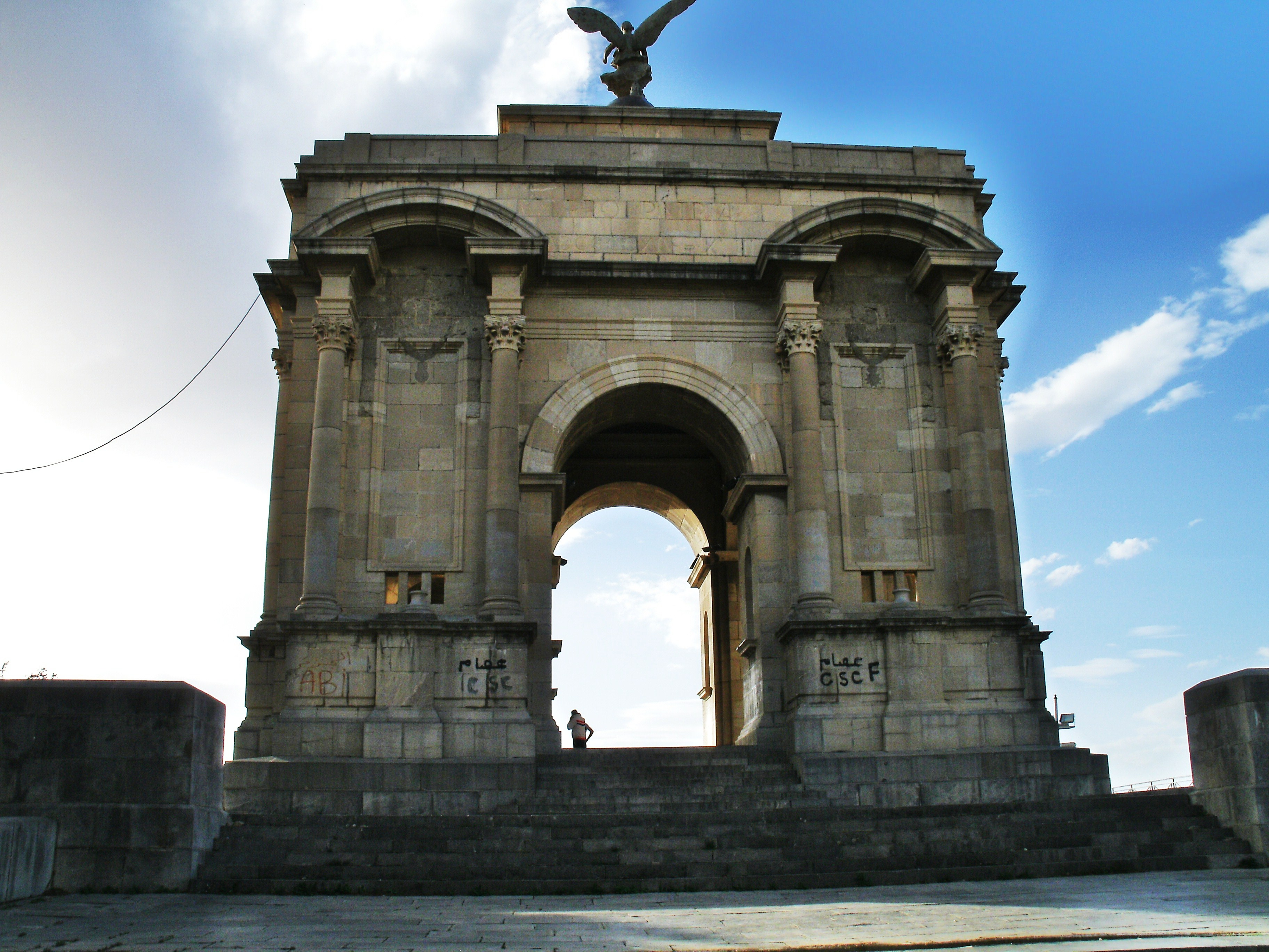 Monument aux morts de la guerre 1914-18.